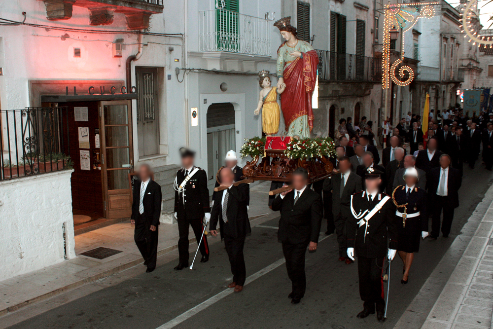 Centro Storico Cisternino, Brindisi